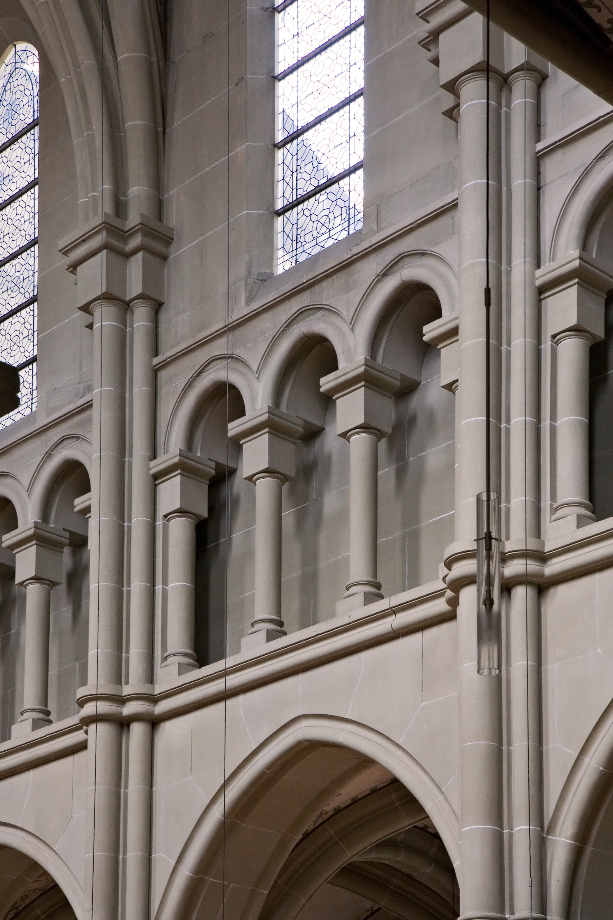 Das Triforium der Kirche St. Peter und Paul in Bern, Schweiz